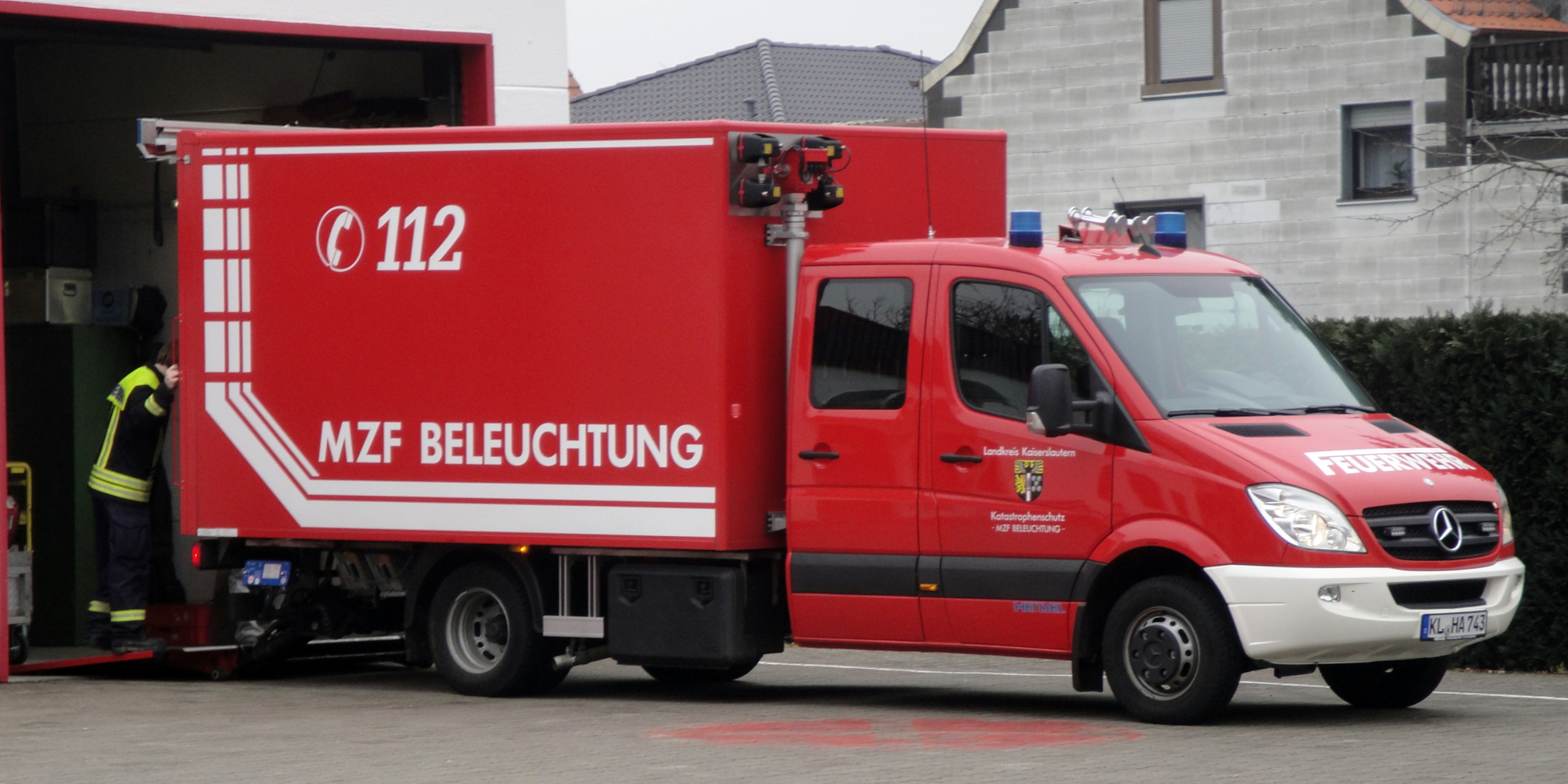 Katastrophenschutz Mehrzwecktransportfahrzeug mit Ladehilfe (Mehrzweckfahrzeug) MZF-Beleuchtung des Katastrophenschutzes des Landkreises Kaiserslautern von Hensel